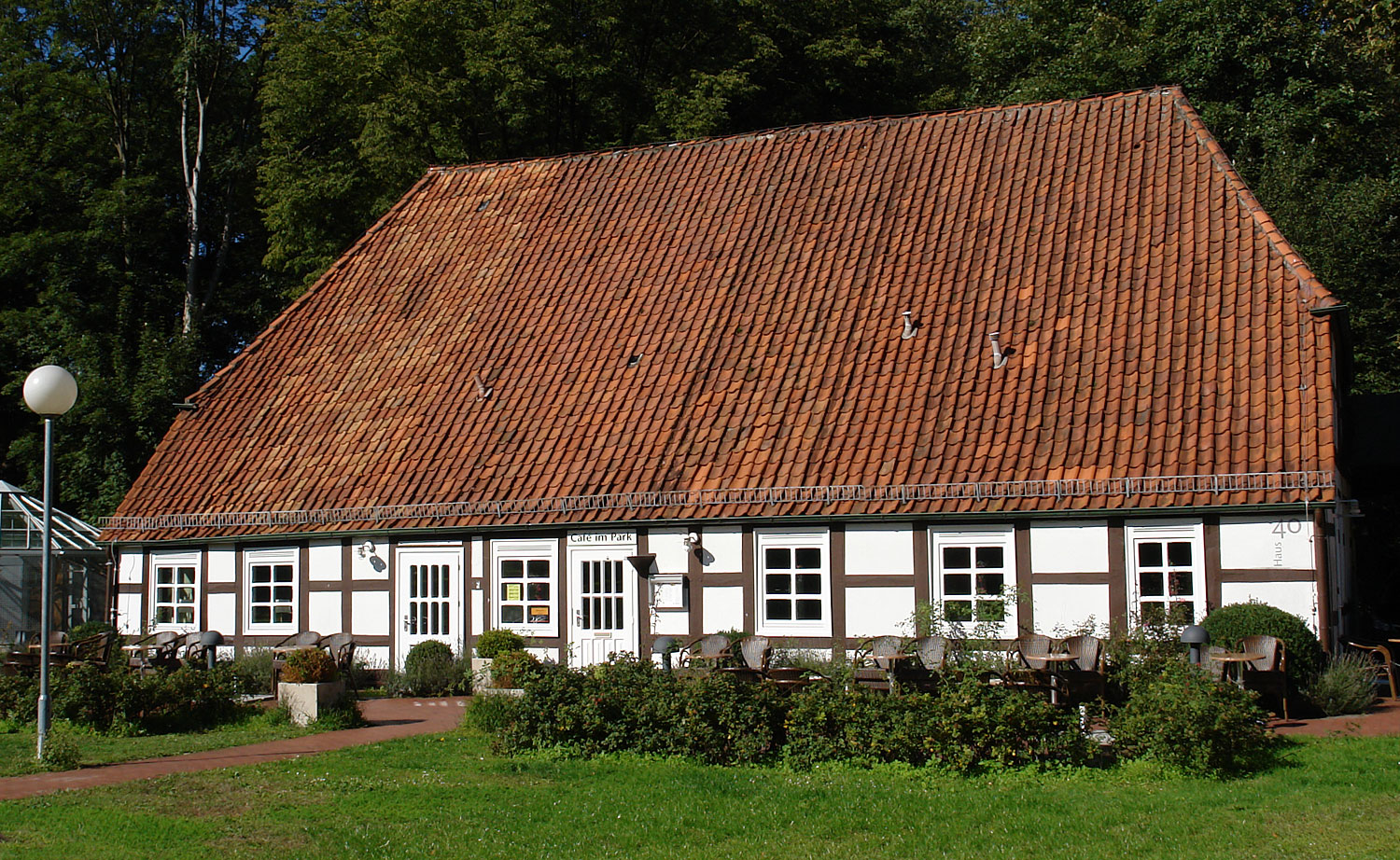 Klinikum Bremen-Ost, Haus 40. Ehemals St. Jürgen Asyl, Haus XXIII und XXIV. Herstellung ?? Funktion: Gutshof/Pferdestall Das abgebildete Objekt ist ein geschütztes Kulturdenkmal in der Freien Hansestadt Bremen, mit der Nr. 1675 beim Landesamt für Denkmalpflege registriert.